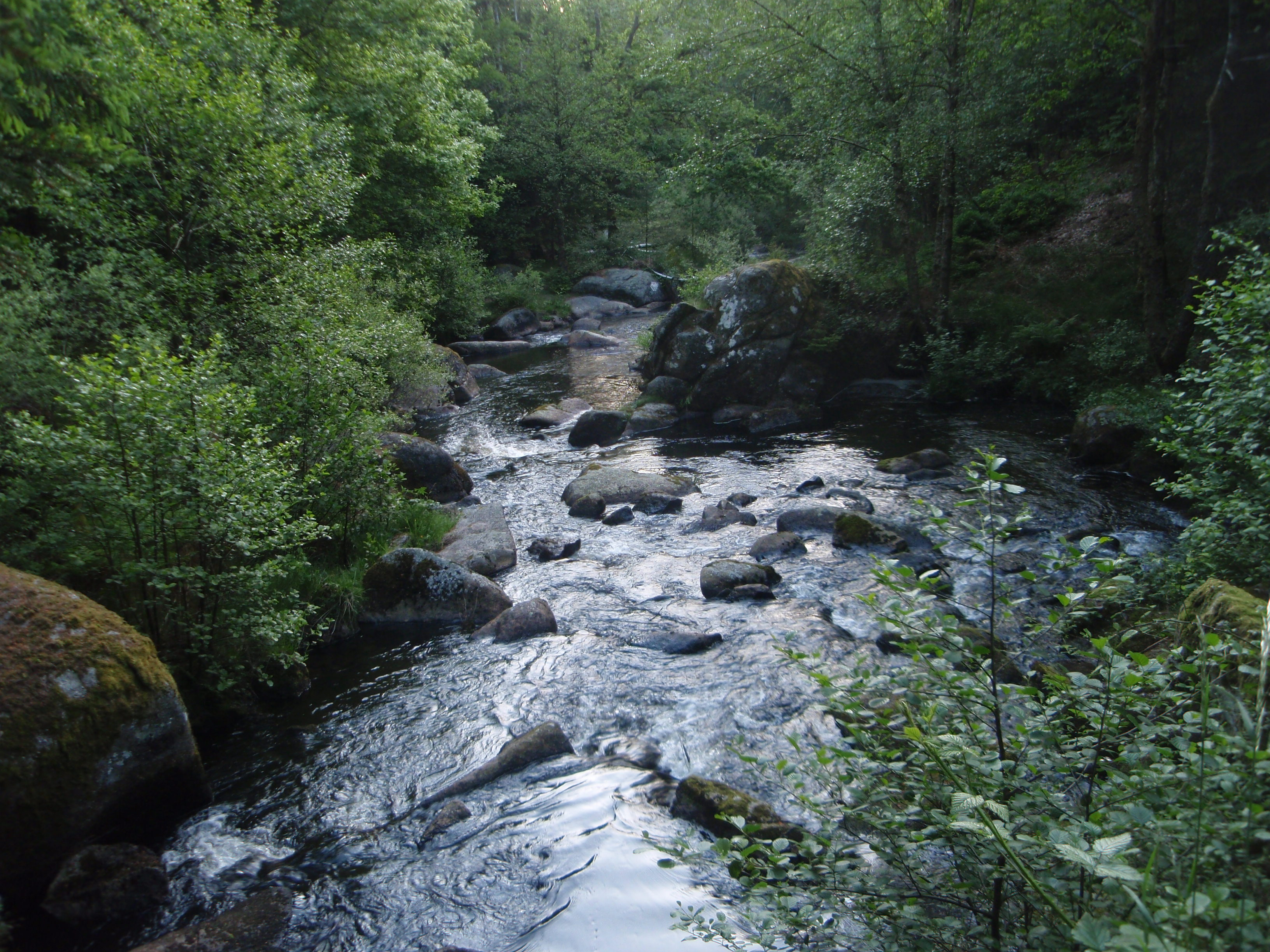 La rigole du diable à Royère-de-Vassivière en Creuse (France)